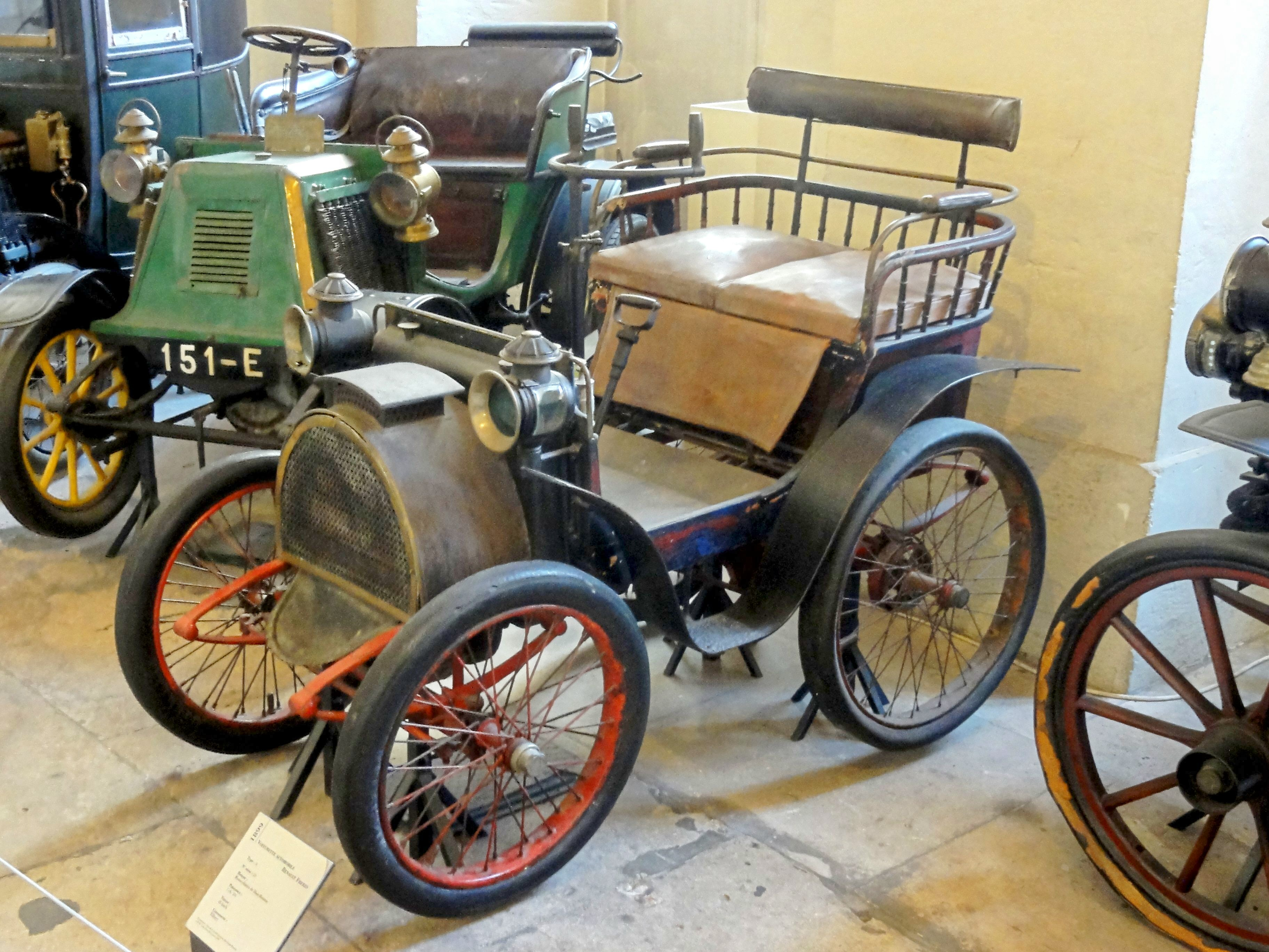 Voiturette automobile Renault frères, type A, 1899.